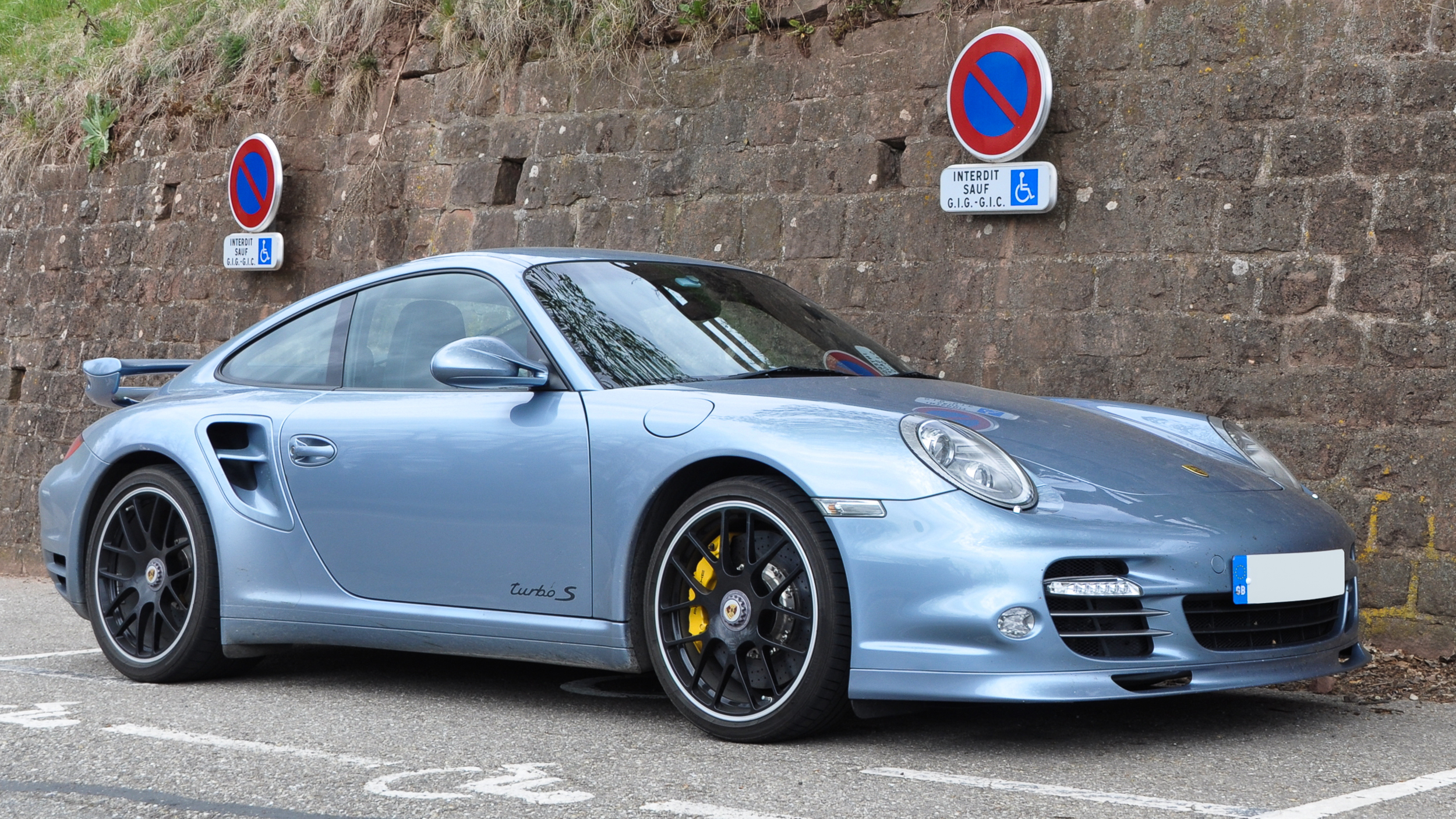 Ein Porsche 911 Turbo S (Baureihe 997)